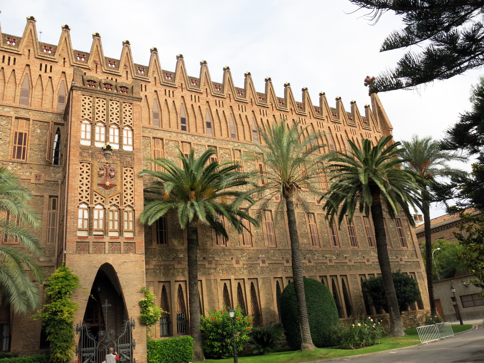 Col·legi Teresià (Barcelona)